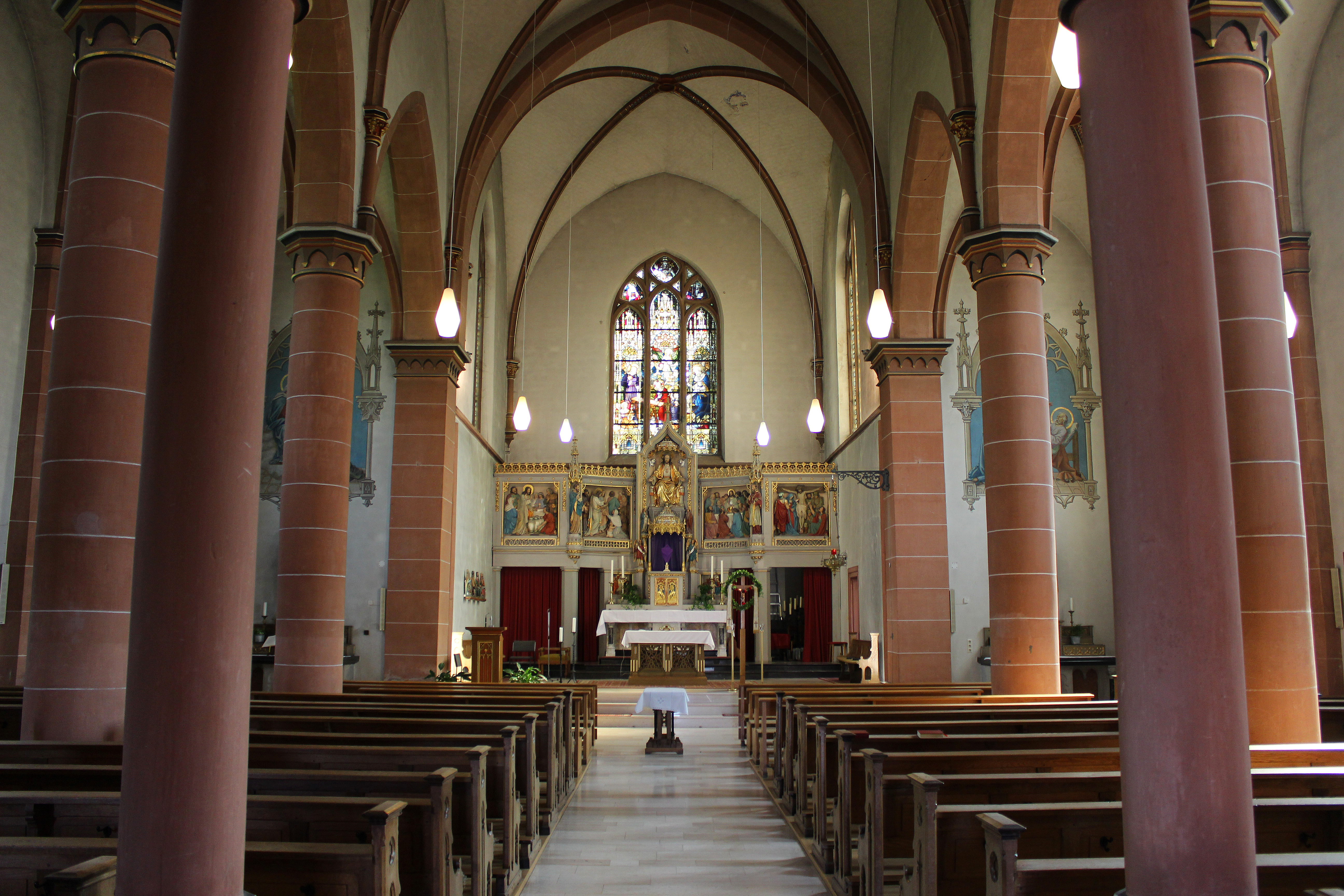 Blick ins Innere der katholischen Pfarrkirche Heilige Familie in Hangard, einem Stadtteil von Neunkirchen/Saar.